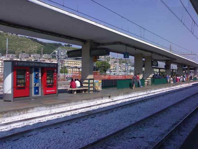 Interno della stazione, piattaforma dei binari 4-5.